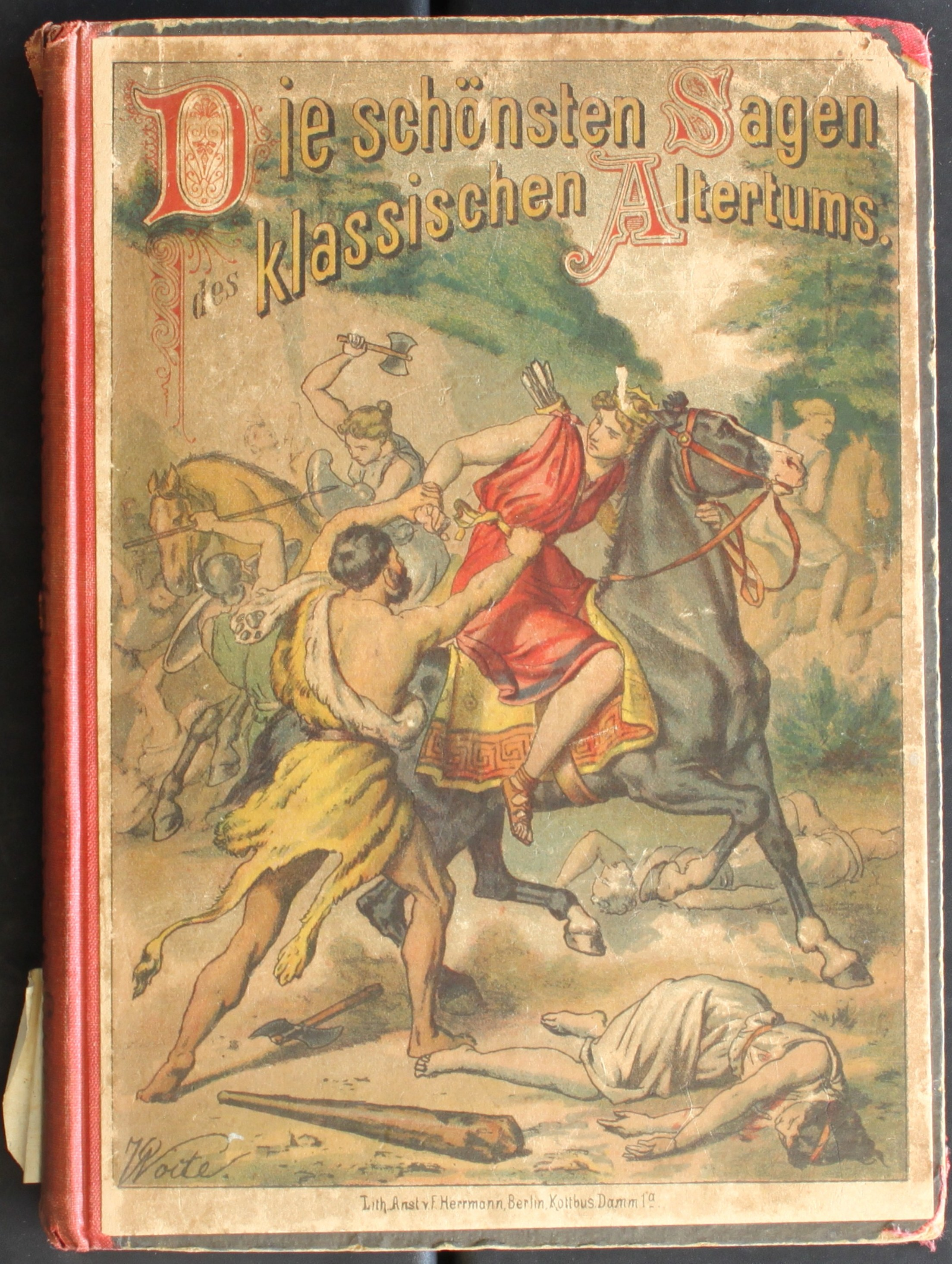 Titelbild von Oscar Woite zu Gustav Schwab: Die schönsten Sagen des klassischen Altertums. Neu bearbeitet von Bertram Grimm. Berlin: C. J. Leo ohne Jahr [1883]. Exemplar des späteren Berliner Studienrats Erich Kiepert (1885–1943), datiert 1894, Sohn von Richard Kiepert